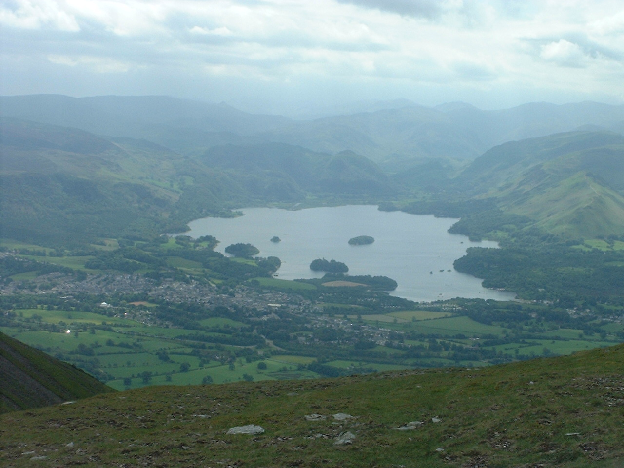 Keswick and Derwent Water from Skiddaw